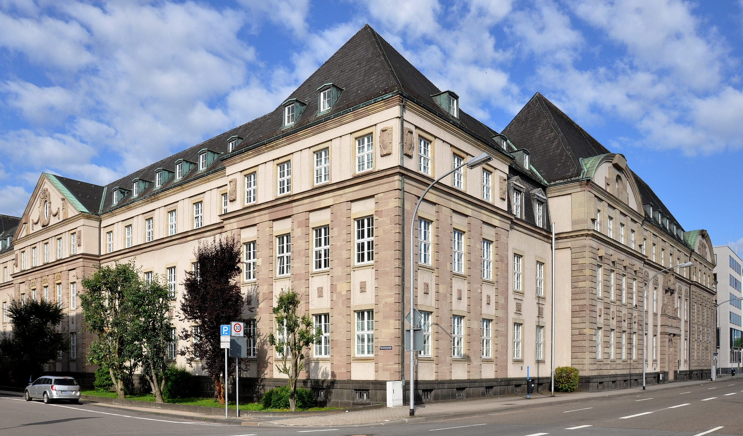 Das Gebäude des Saarländischen Oberlandesgerichts und des Landgerichts Saarbrücken in der Franz-Josef-Röderstr. 15, Saarbrücken.